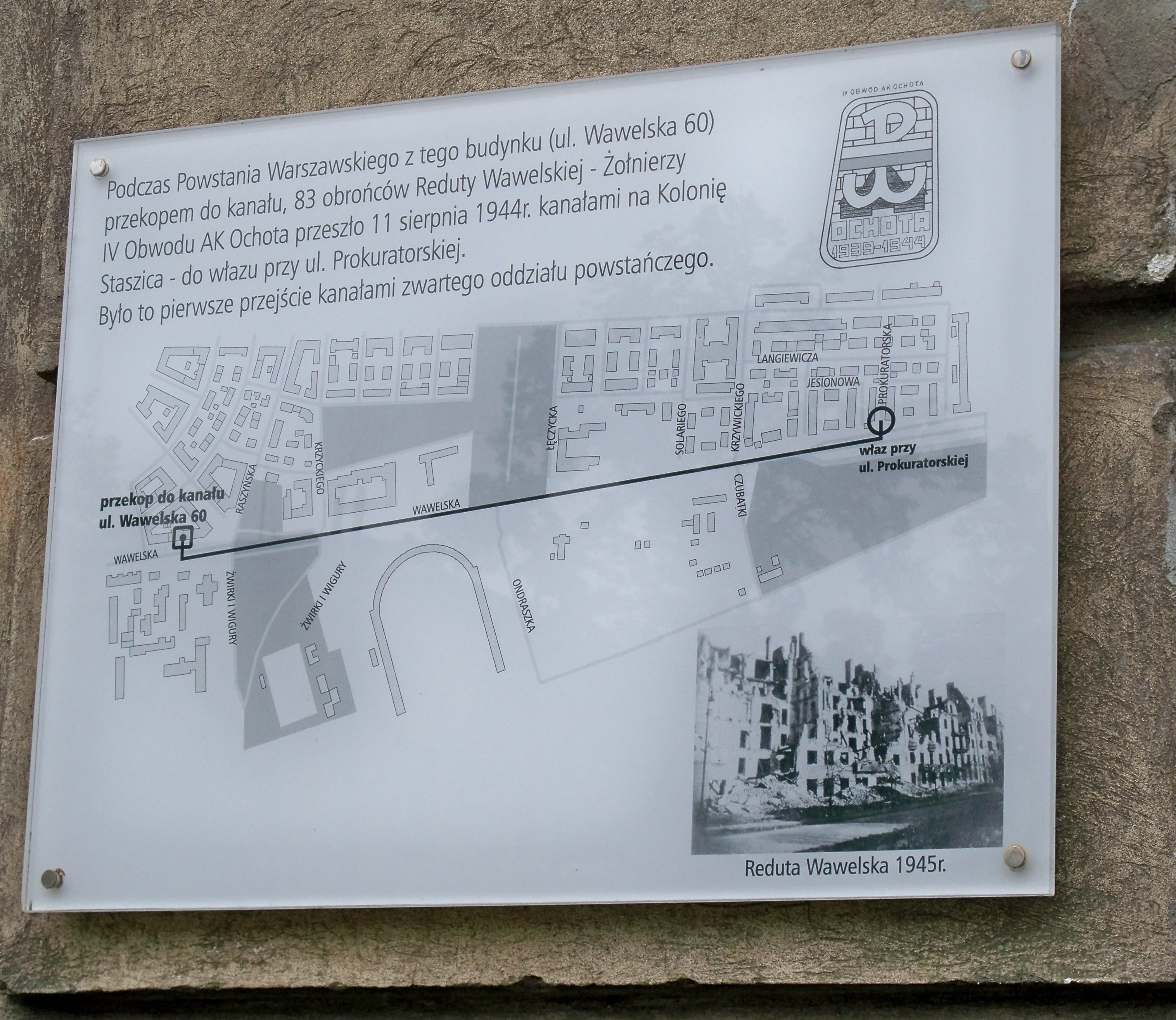 Tablica upamiętniająca Redutę Wawelską oraz przejście kanałami (Powstanie Warszawskie). Ul. Wawelska 60.